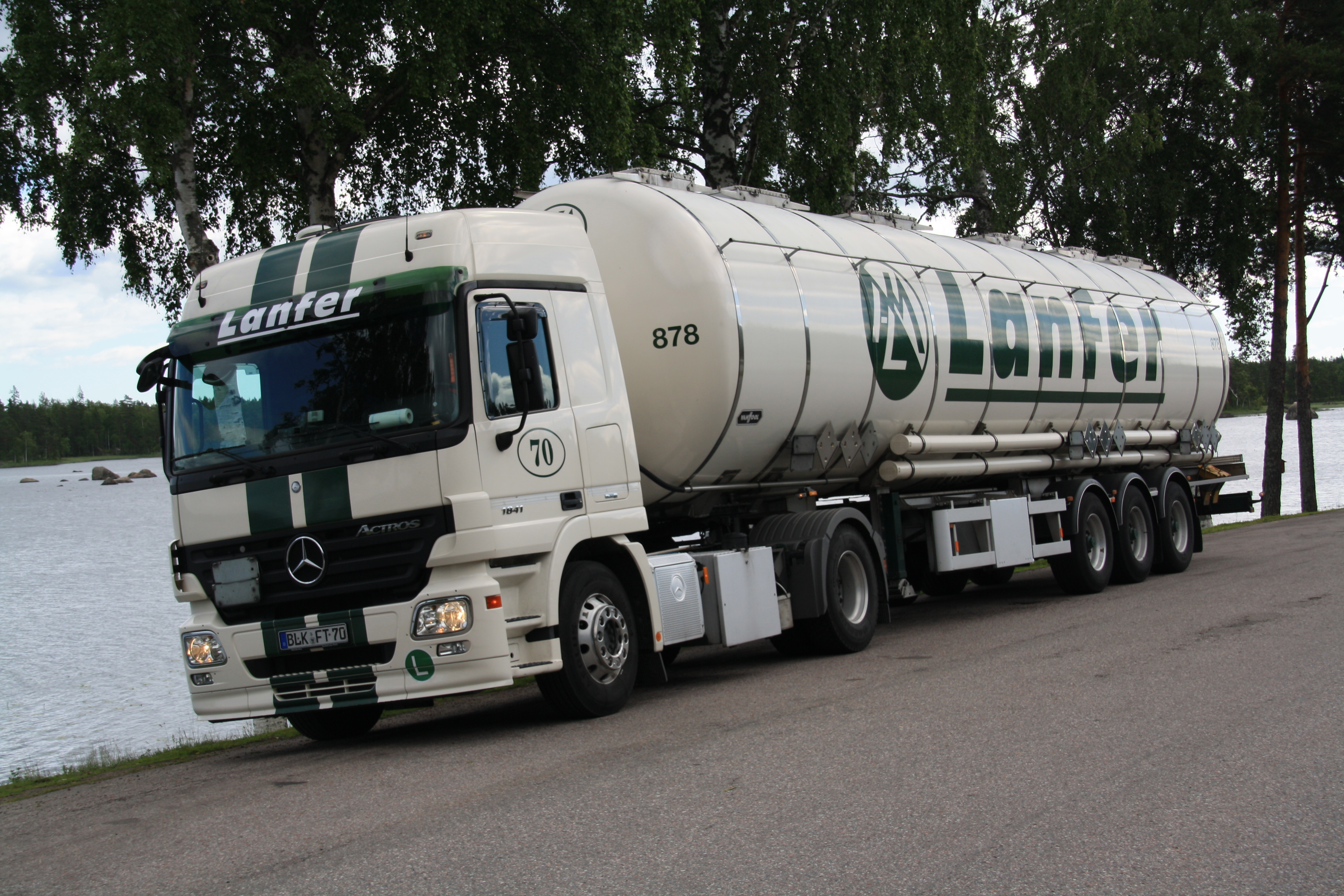 3 Kammer Spezial-Jumbo-TKW mit insgesamt 58,0cbm Fassungsvermögen